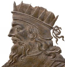 Auteur Dassier, Jean (1676-1763 ; médailleur) Titre Médaille Publication [Paris], [ca 1720] Description : bronze ; 31 mm ; 15,37 g Licence GPL et GFDL Notes Acq. 95-0632 Cote : BNF Richelieu Monnaies, médailles etantiques exemplaire unique L'ensemble est conservé dans deux boîtes cylindriques en buis. Tranche cannelée Identifiant 07700003 Détail du contenu : No d'image 1 Titre Mérovée roy de France Notes 1720 Sujet(s) Mérovée (vers 448-vers 457 ; roi des Francs) Modifié par Rinaldum 11 jan 2004 à 21:30 (CET) Image trouvé sur le site Gallica de la BNF